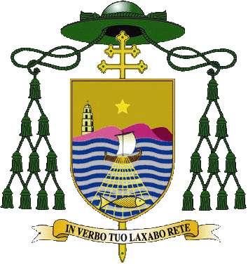 stemma episcopale di Rocco Talucci, arcivescovo di Brindisi